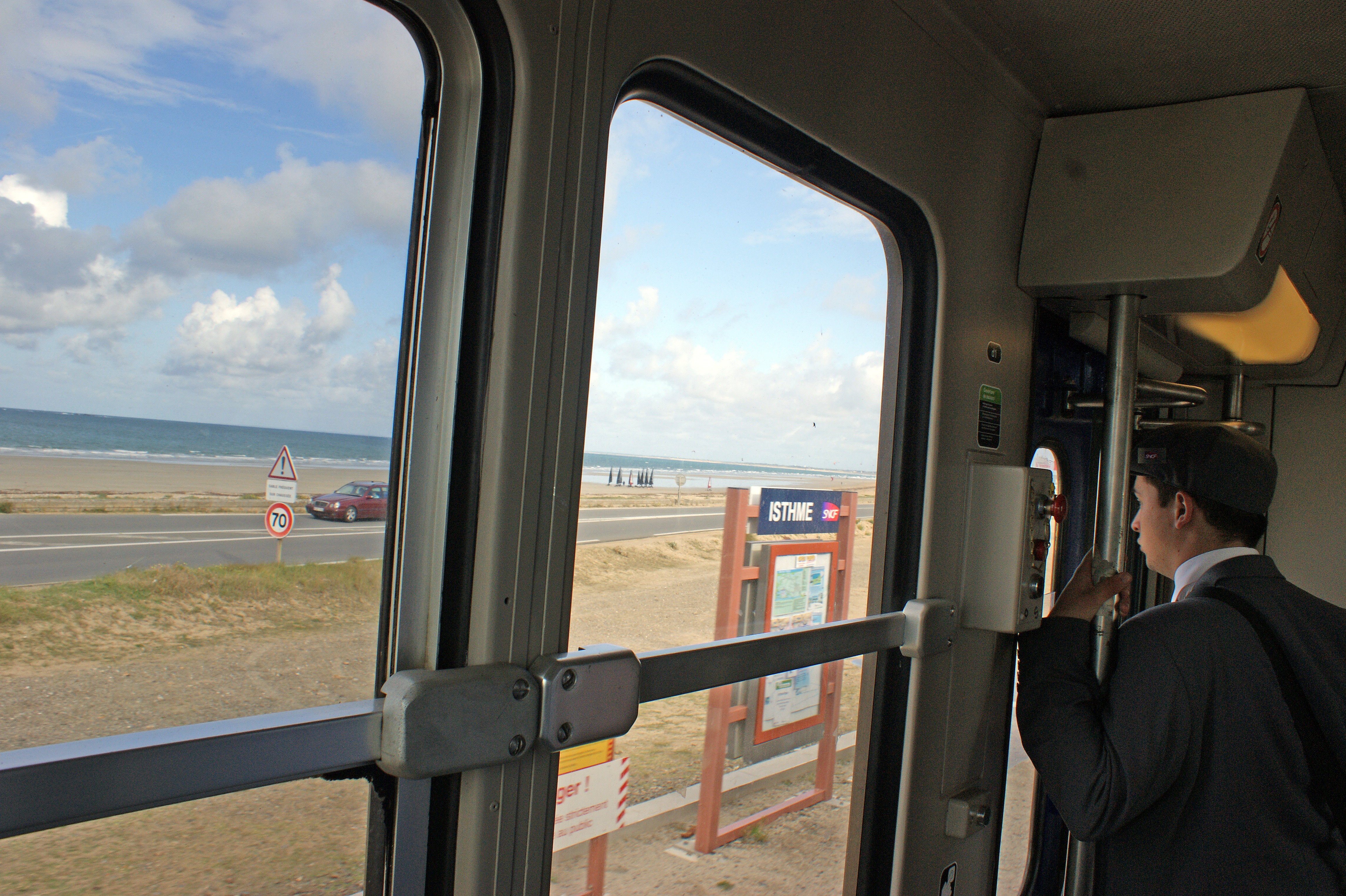 La halte vue de l'intérieur du Tire-bouchon, en arrière plan l'océan Atlantique en direction de Lorient et l'Île de Groix.